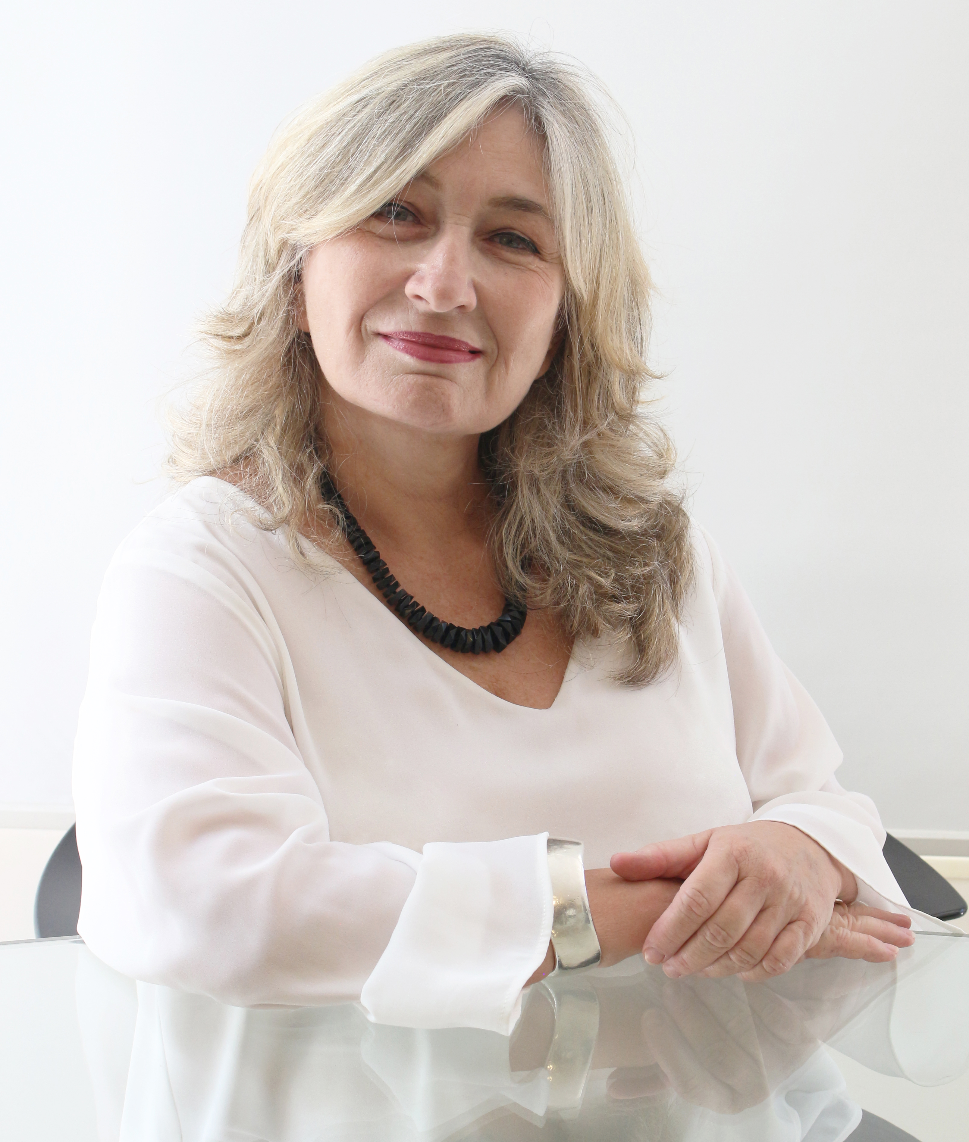 בתיה סבירסקי מלול, 2020